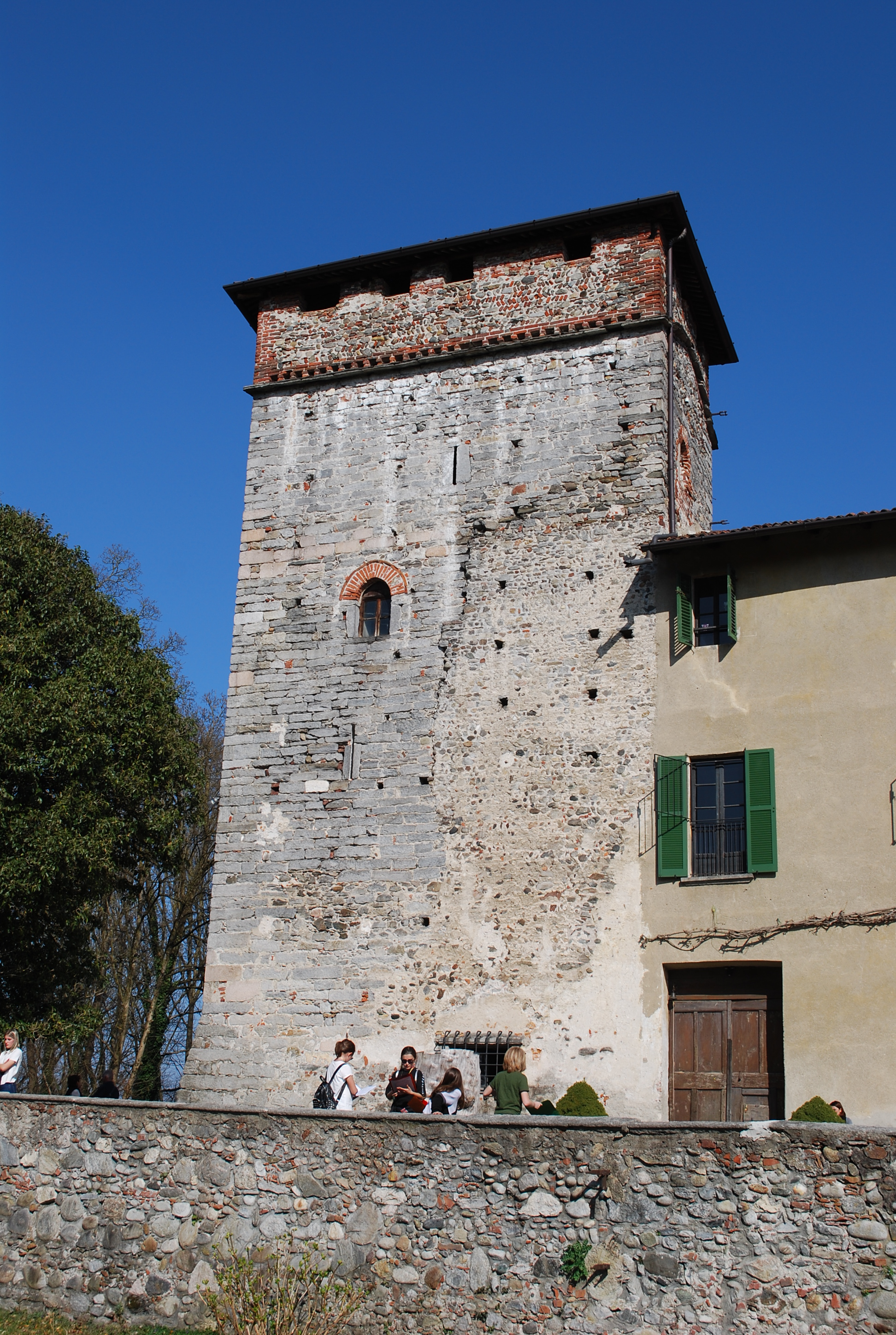 Castello Visconteo di Castelletto sopra Ticino, torrione